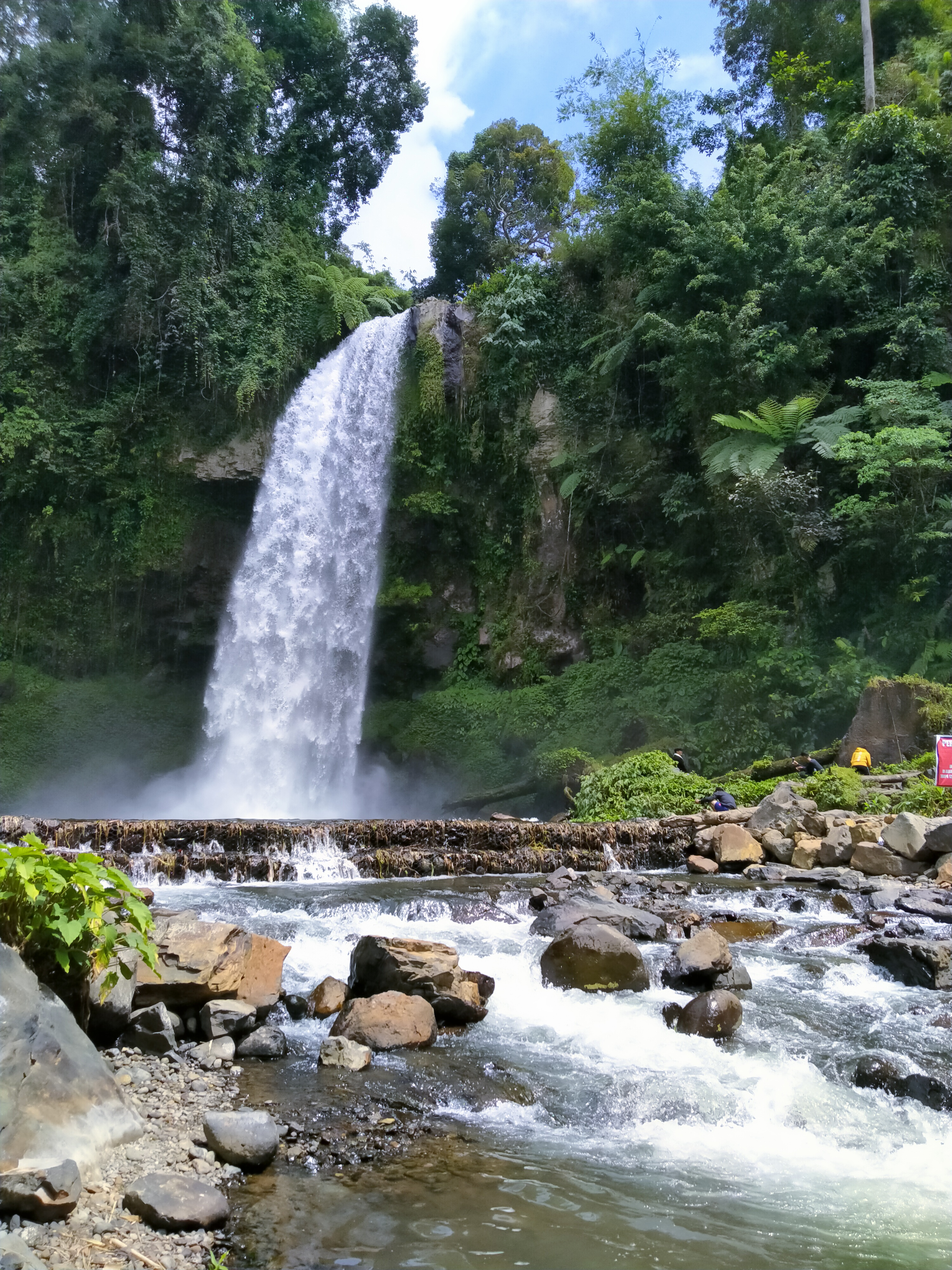 Air Terjun Sigerincing